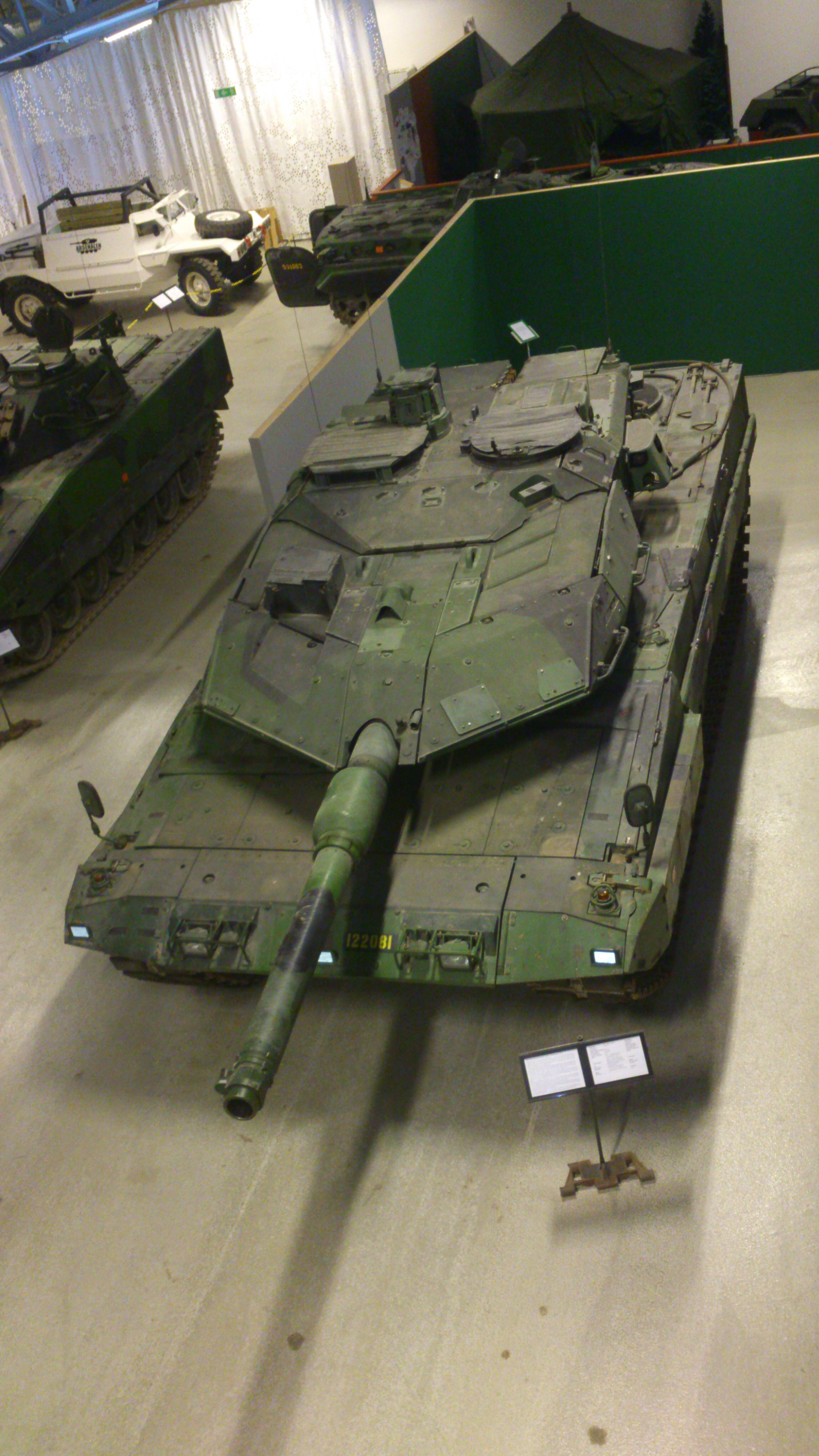 Stridsvagn 122 på Försvarsfordonsmuseet Arsenalen i Strängnäs